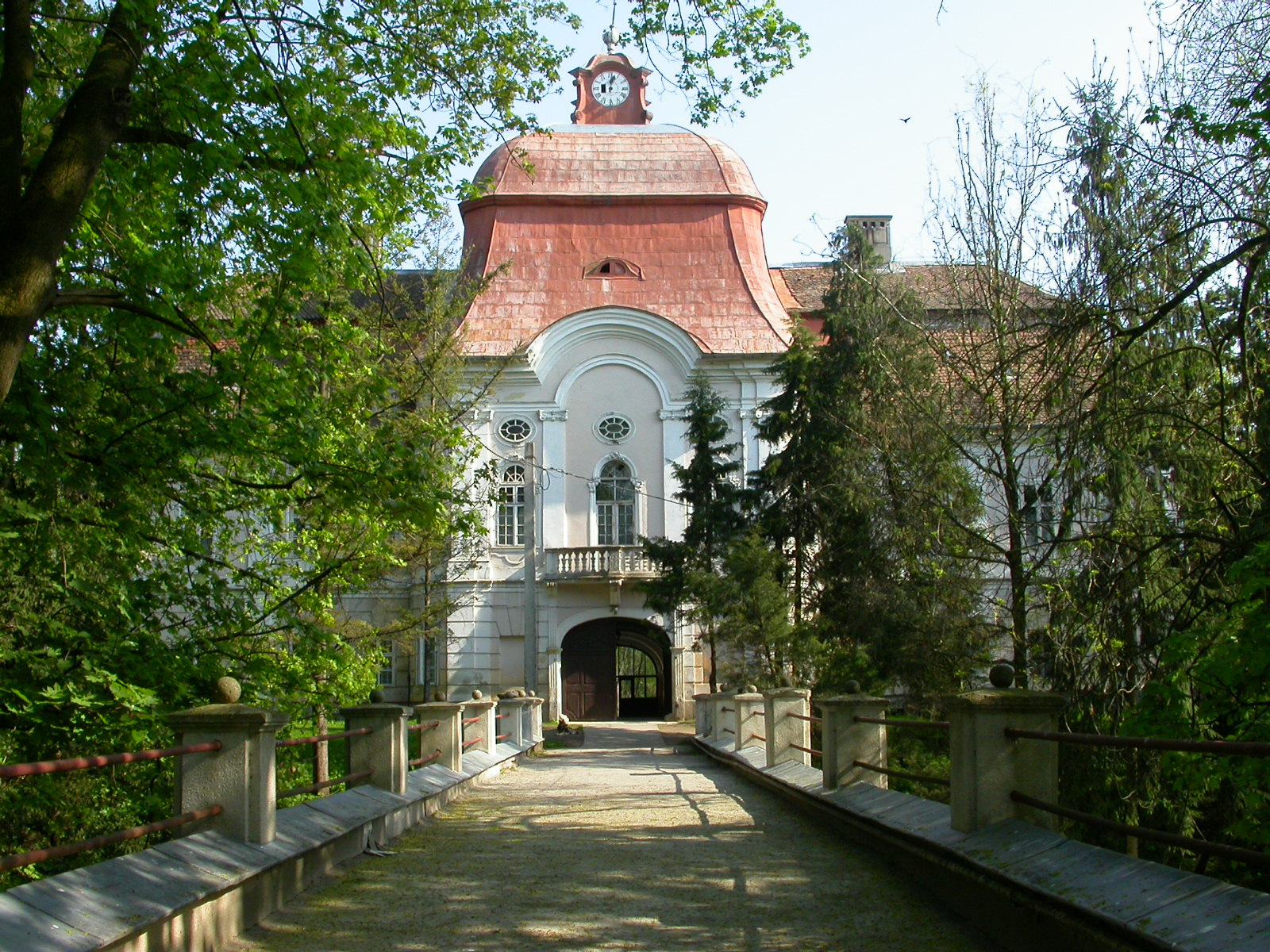 Ansamblul castelului Teleki, sec. XVIII - XIX